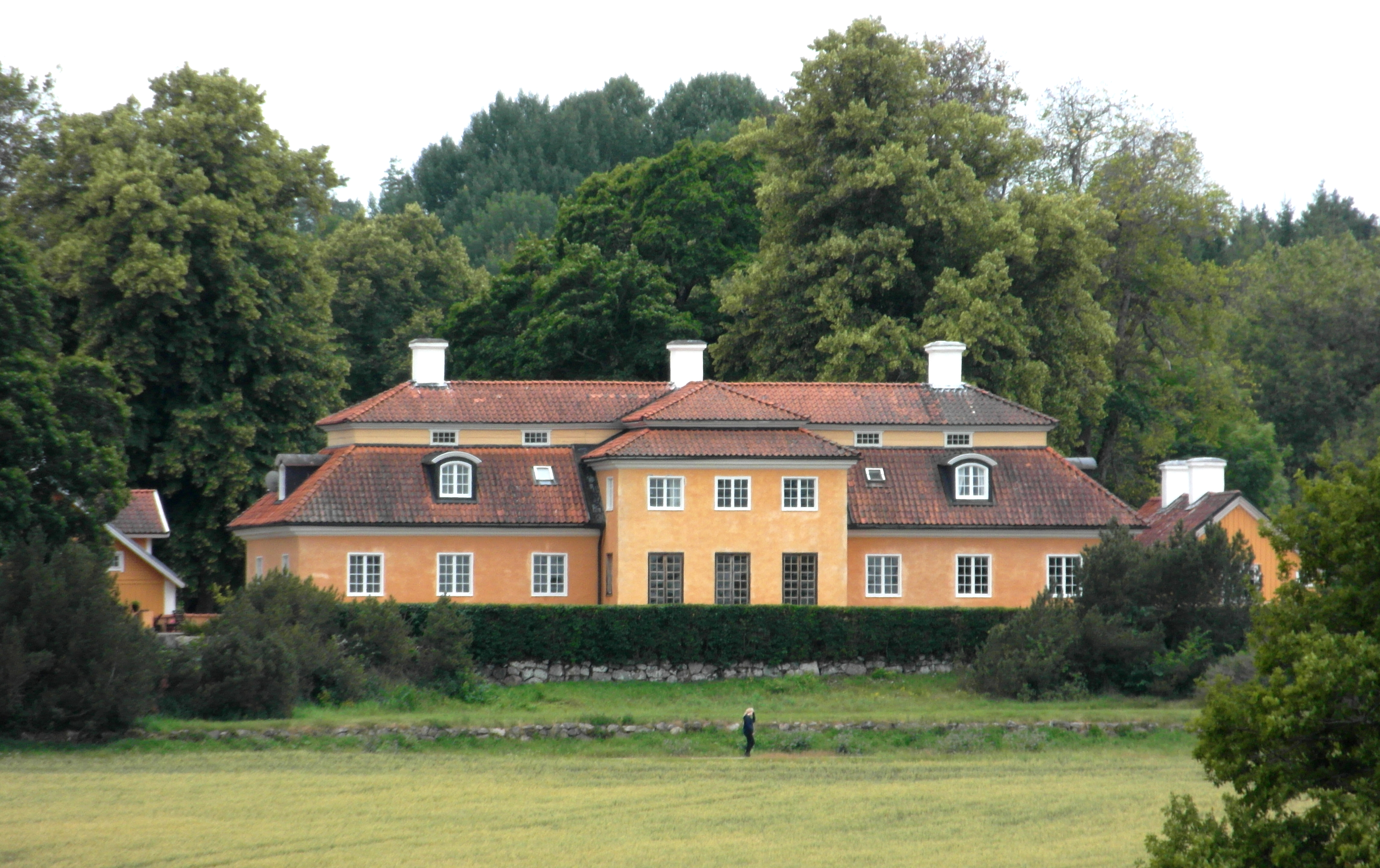 Berga, Åkers socken, Södermanland, juli 2013